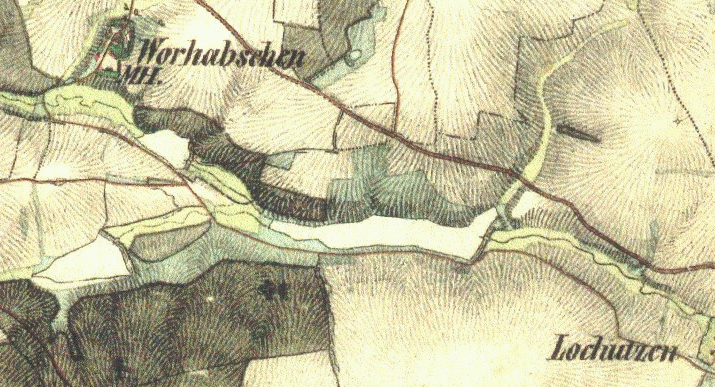 Rybníky na Touškovském potoce na výřezu z mapy II. vojenského mapování: zleva Nový rybník na bezejmenném přítoku, Starý rybník a místo dnešního Lochousického rybníka, v době tvorby mapy ještě neexistujícího.